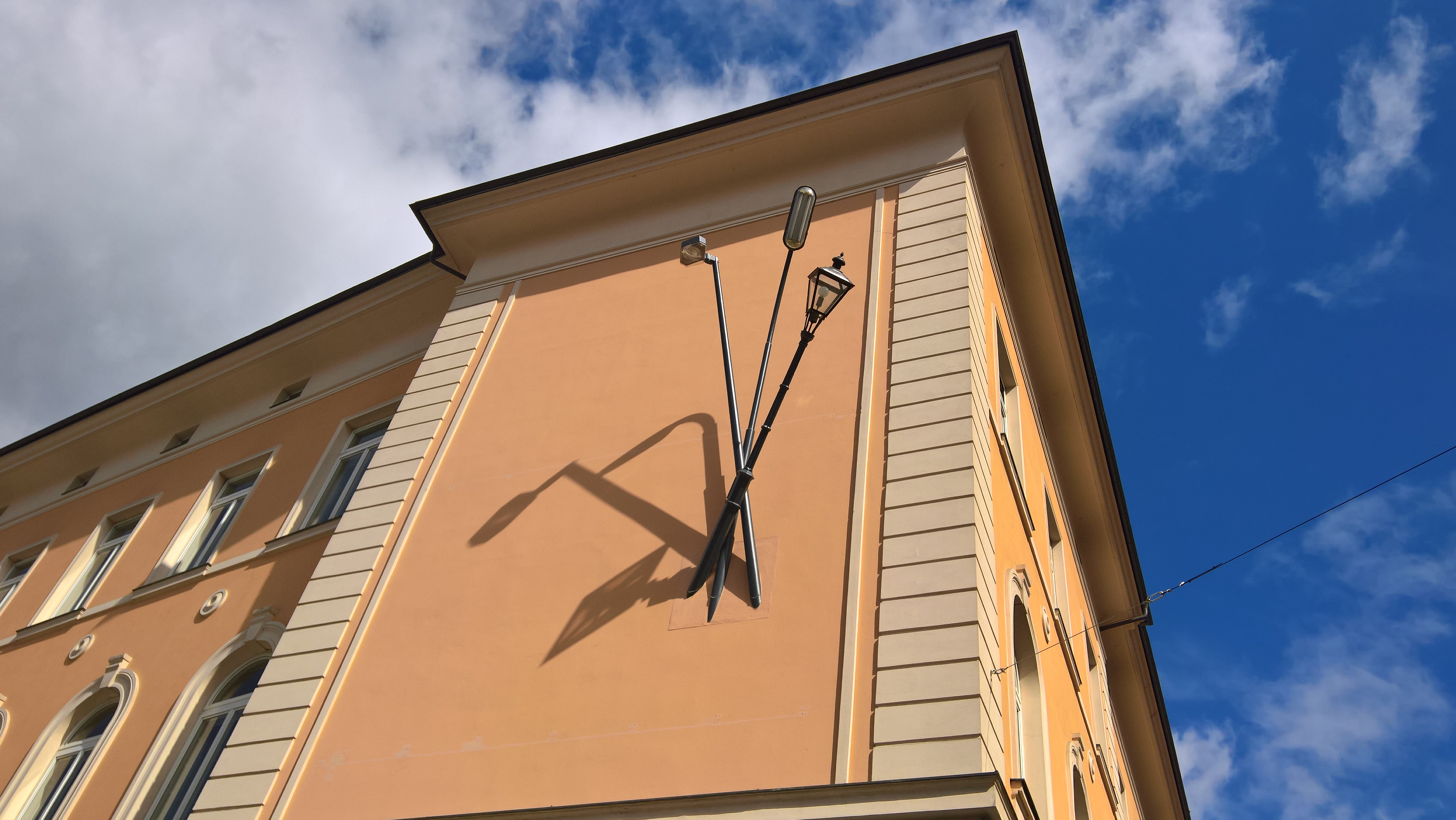 Akademisches Gymnasium Graz, Installation Manfred Erjautz: "Skulpturale Akupunktur", ab April 2017